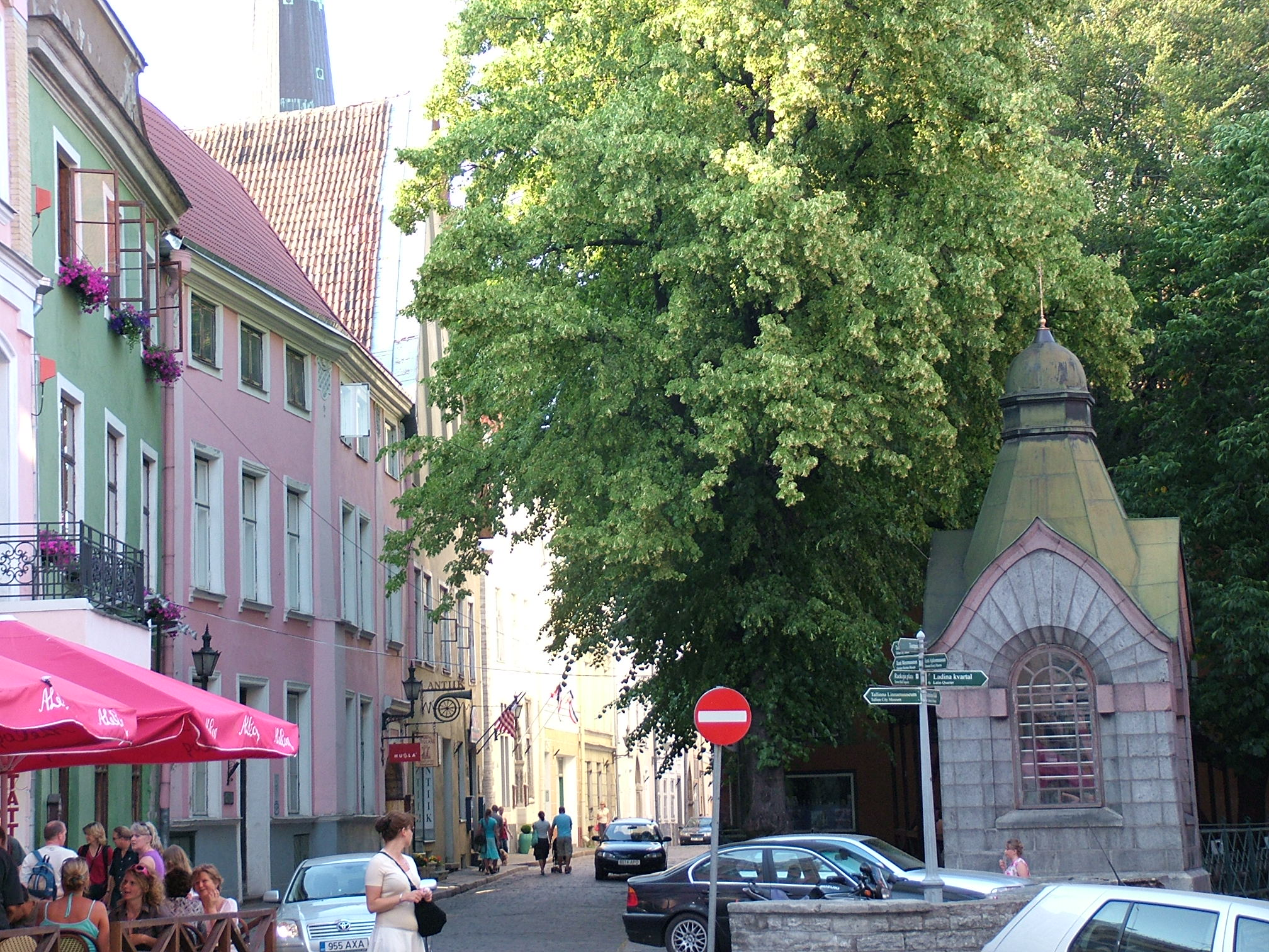 Street in Tallinn, Estonia.